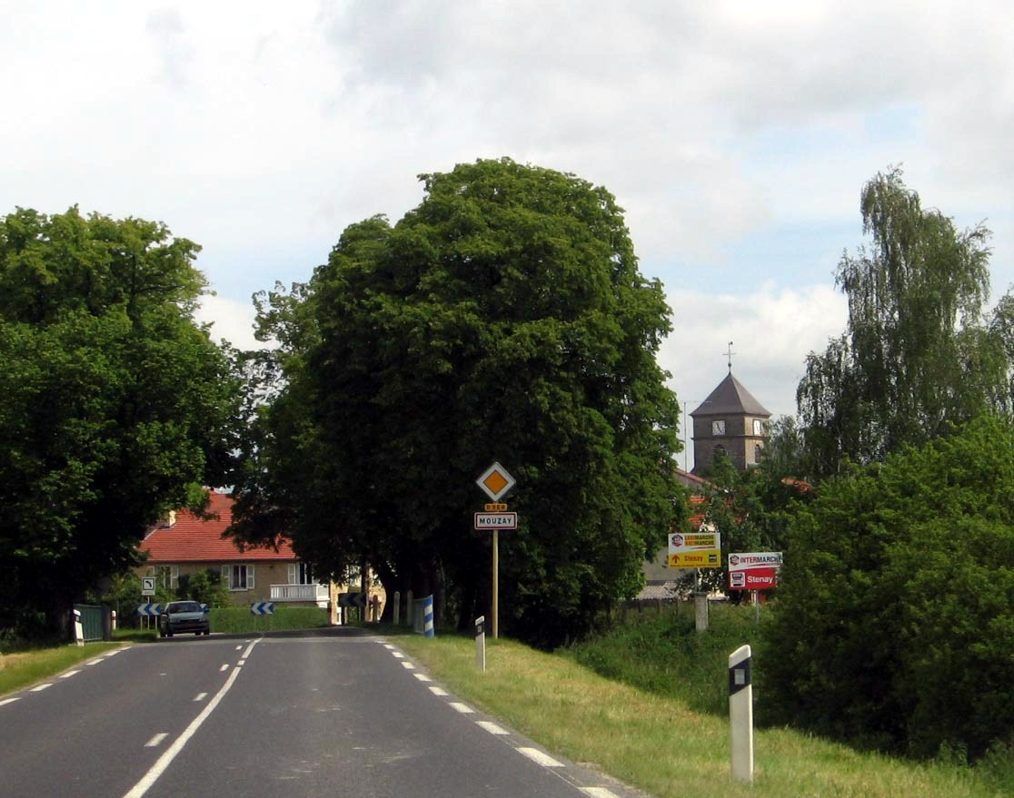 Mouzay